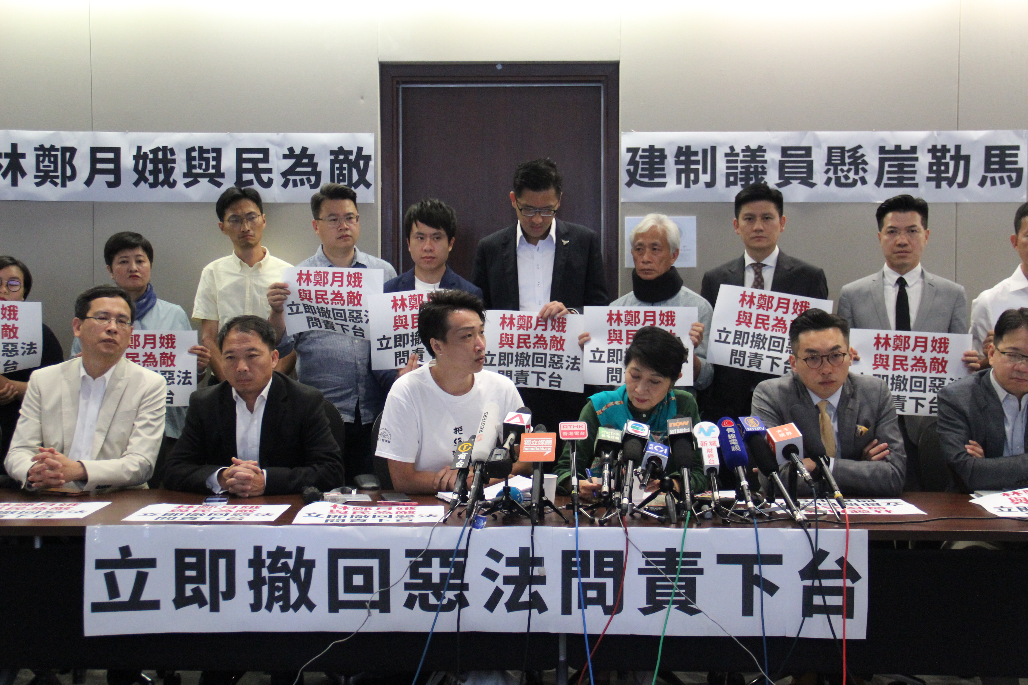 2019年6月10日凌晨，香港民陣舉行記者會說明下一步行動意向（美國之音記者申華拍攝）